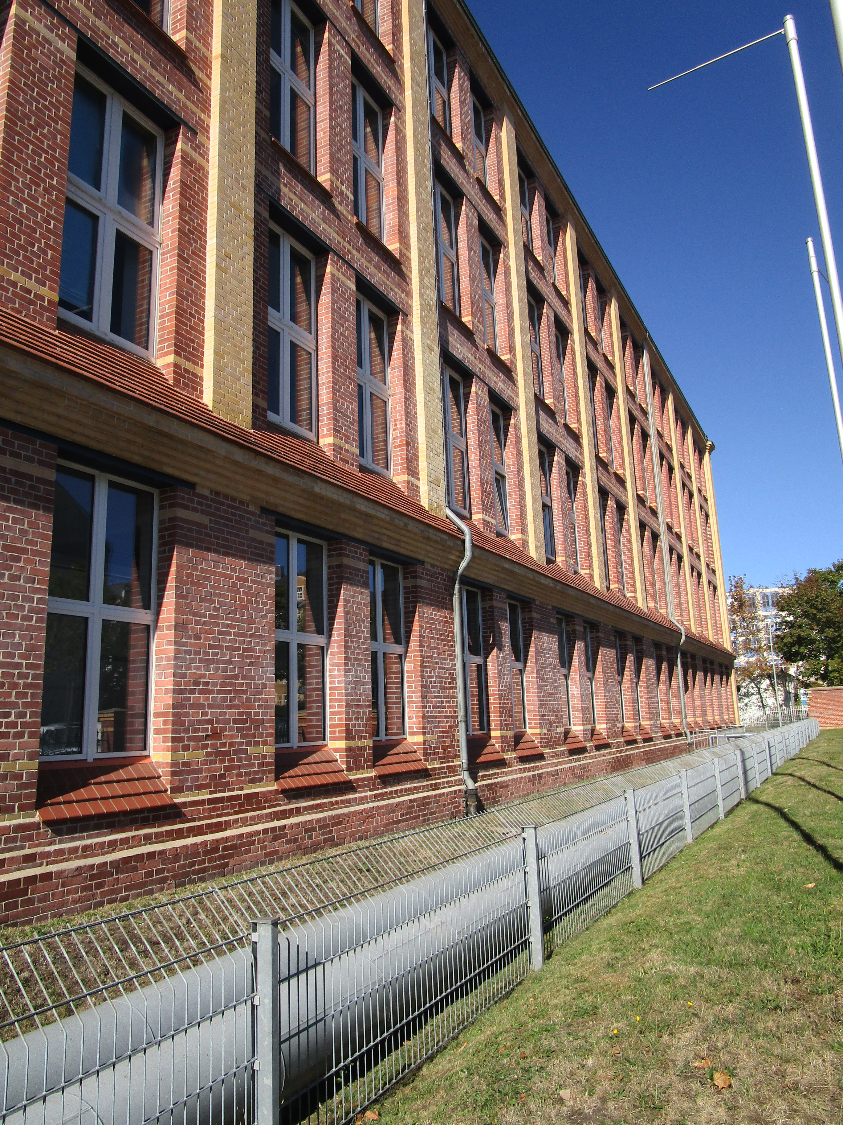 Staatsarchiv Chemnitz: Seit 2013 im Peretzhaus, Elsasserstraße 8. Die Peretz AG gehörte zu den weltbekannten Strumpffabriken in Chemnitz. Die jüdische Familie Peretz wurde in der Zeit des Nationalsozialismus verfolgt. Siegfried Peretz, Jahrgang 1859, und seine Frau Lina, geborene Aeberlein, Jahrgang 1860, wurden – so der Text auf den Stolpersteinen auf dem Bürgersteig vor dem Eingang zum Staatsarchiv – in der Verfolgung „gedemütigt, entrechtet“: „Flucht in den Tod 3. 5. 1943“. Auf dem Stolperstein für Albert Peretz, sicher ein Sohn, steht: „Jahrgang 1880, denunziert 1942, Gefängnis Chemnitz, 1942 Buchenwald, 1942 deportiert Auschwitz, 13. 12. 1942“